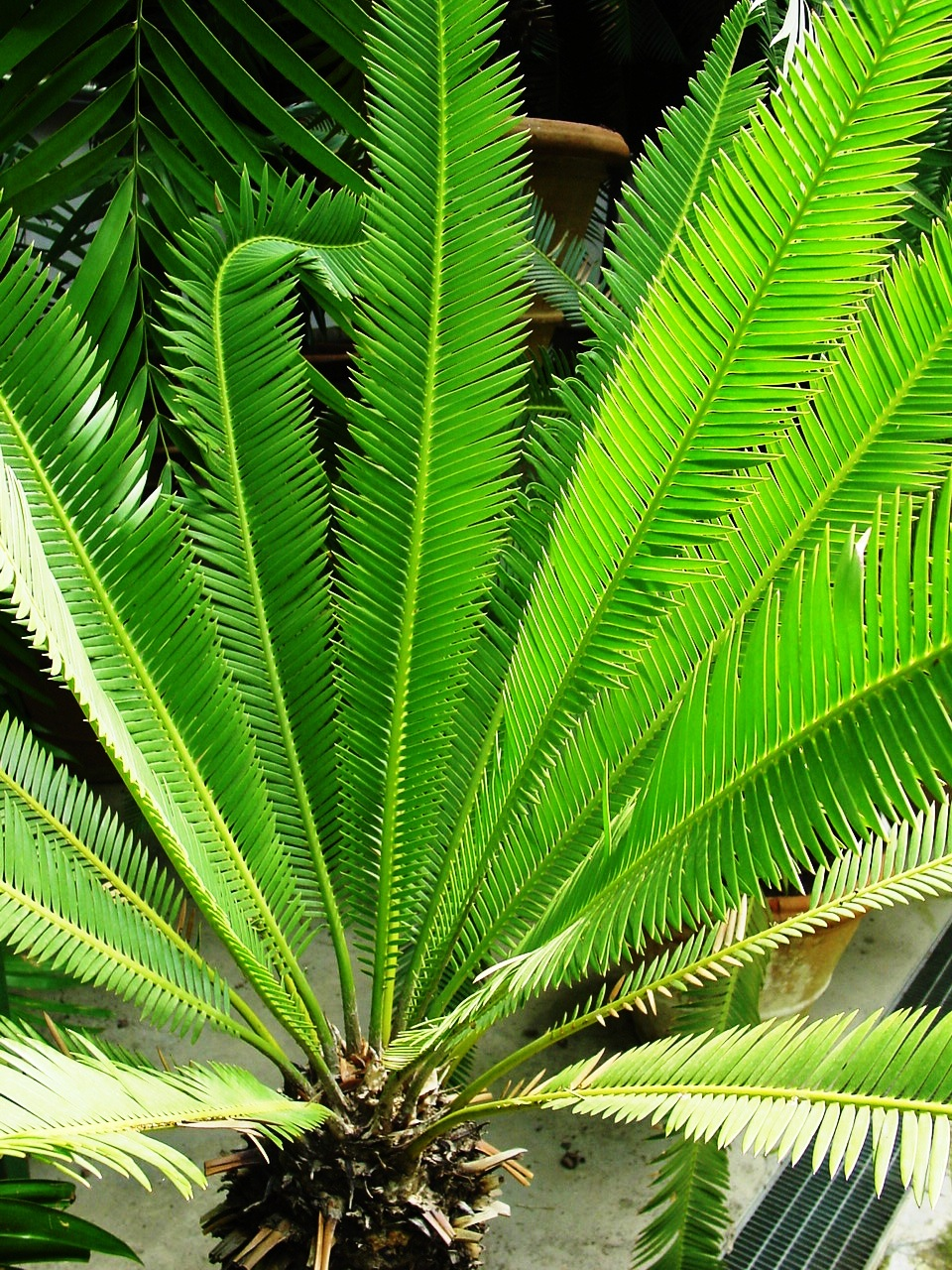 Dioon purpusii (Giardino dei Semplici, Florence, Italy)